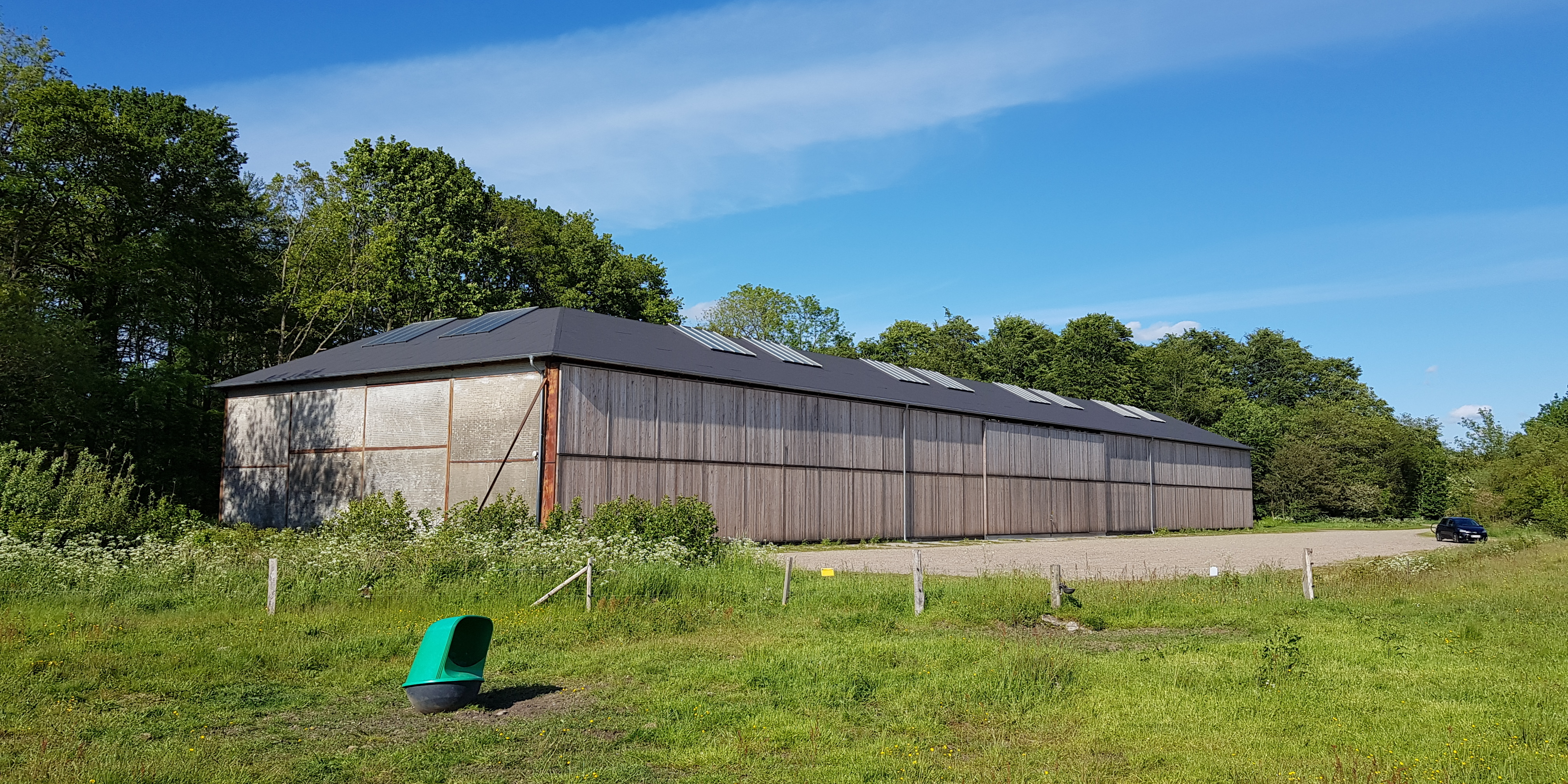 Tønder luftskibsbases flyhangar